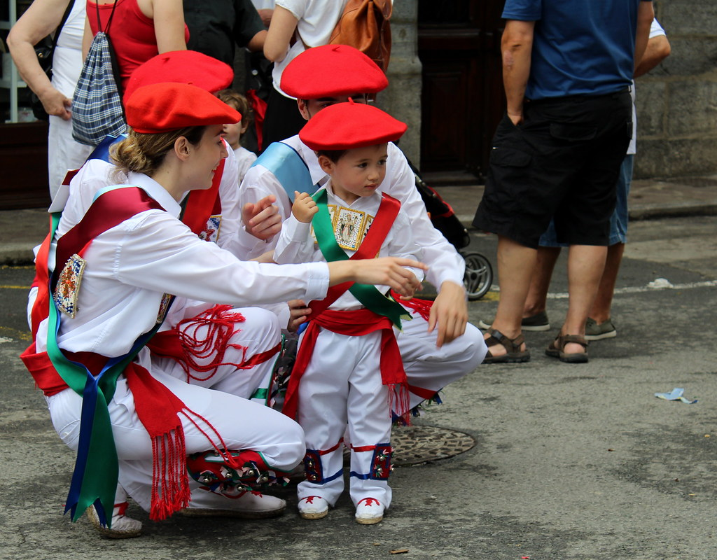 Lesakako dantzak.